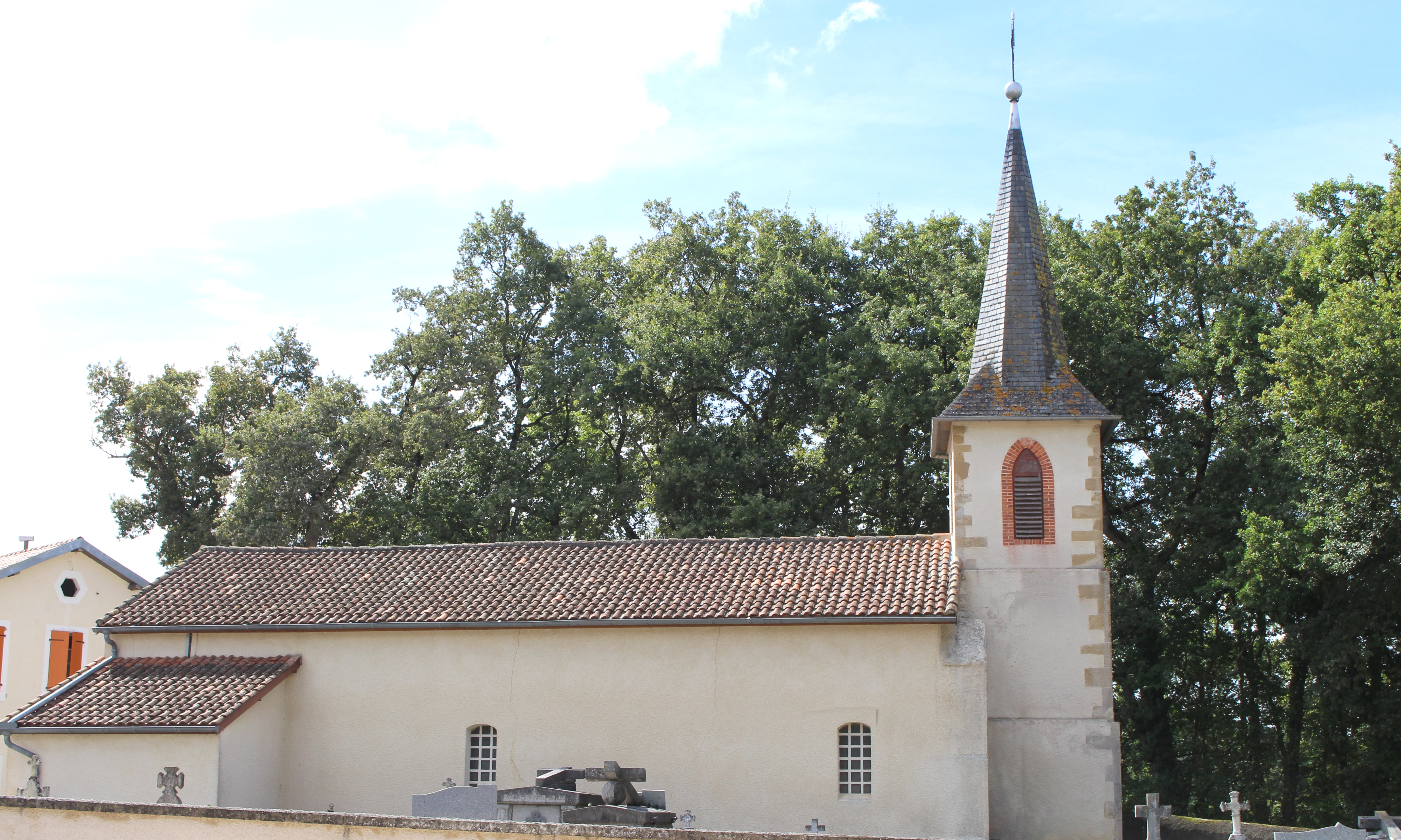 Église Saint-Michel de Villemur (Hautes-Pyrénées)